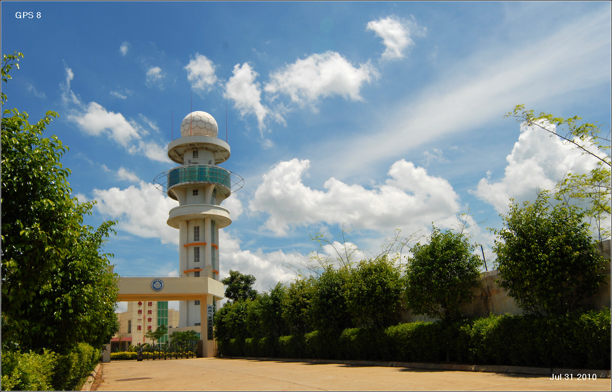 海南省气象预报预警中心2010